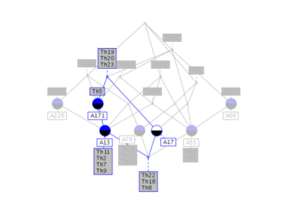 Treillis de Galois : Hierarchisation socio-sémantique de la copublication entre chercheurs, autours de thèmes de recherche partagés.